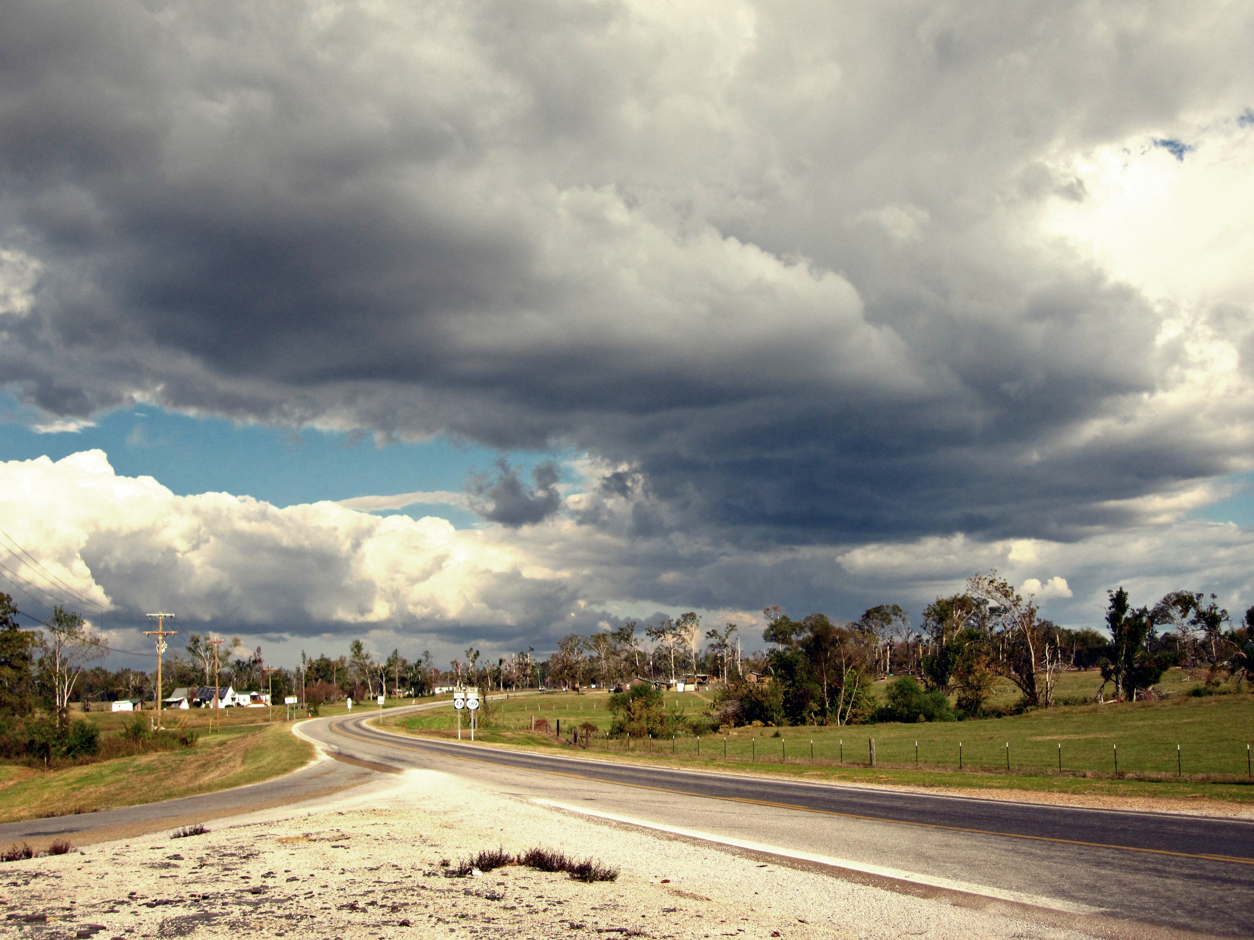 Clouds over Montpelier